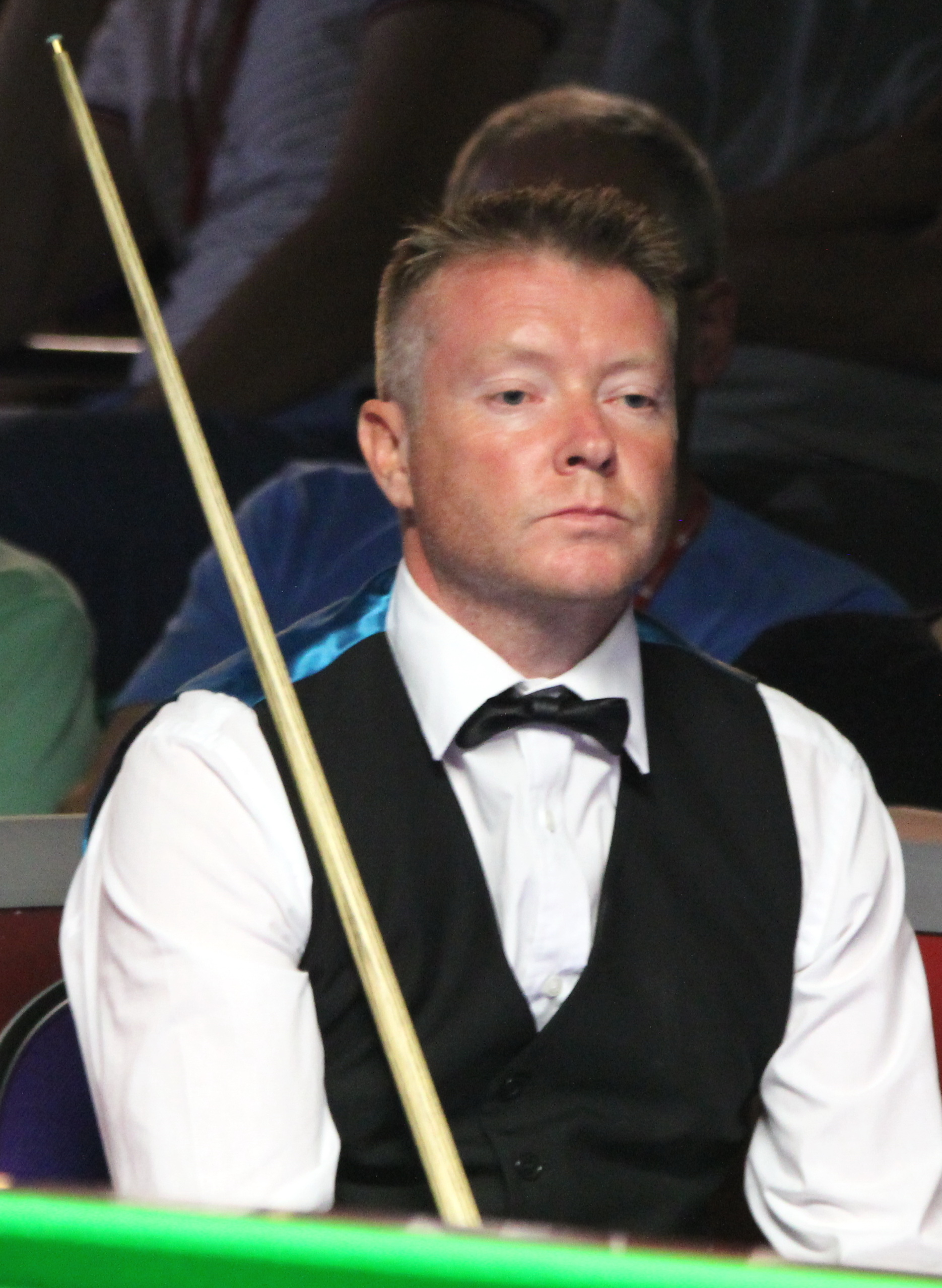 Gerard Greene beim Paul Hunter Classic 2016